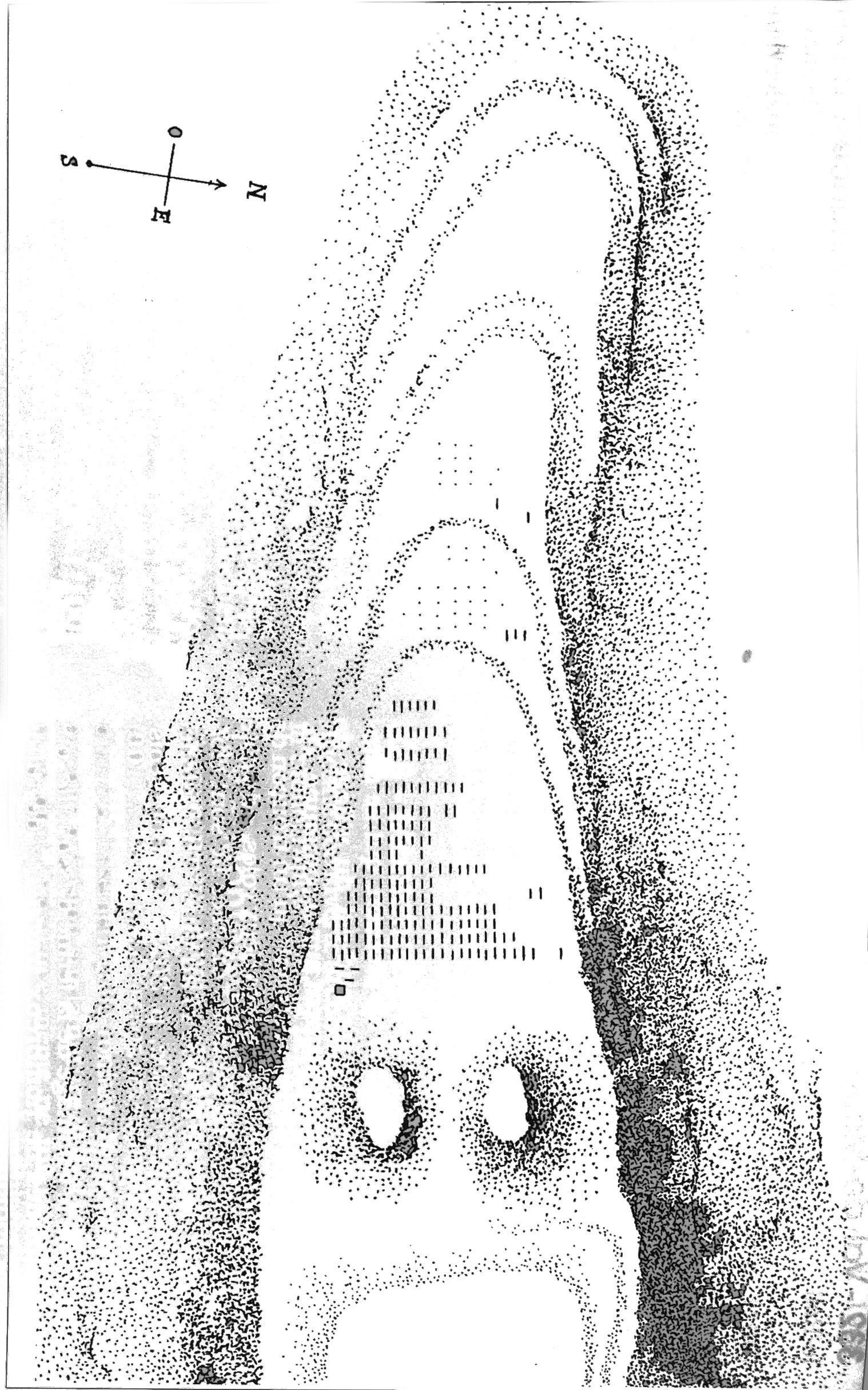 dessin de cf. titre.